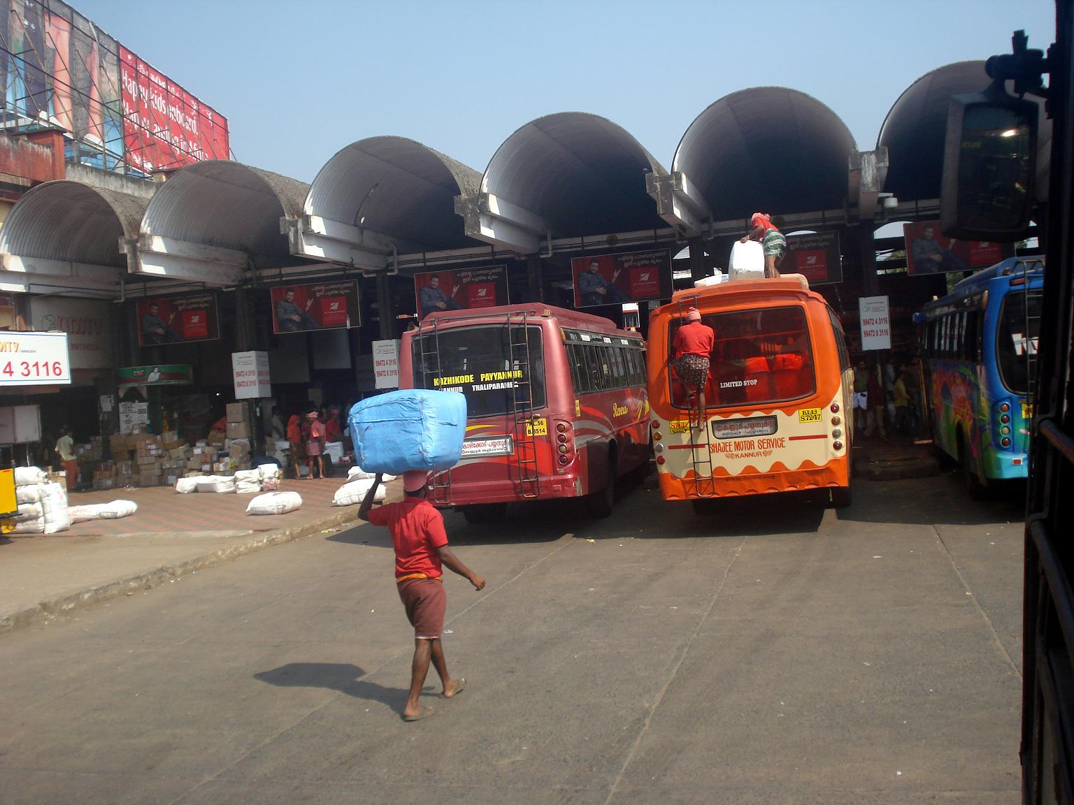 Kozhikode bus stand